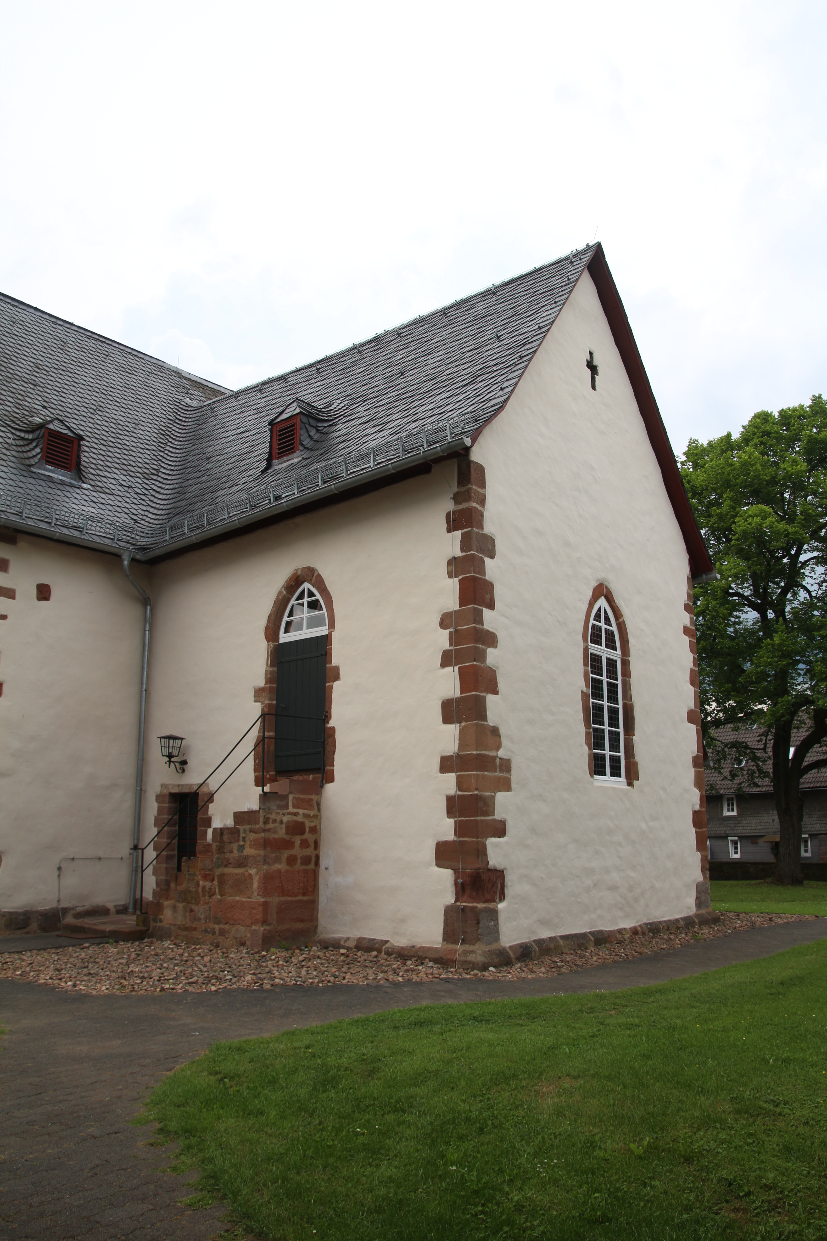 Siehe Bild und Dateiname